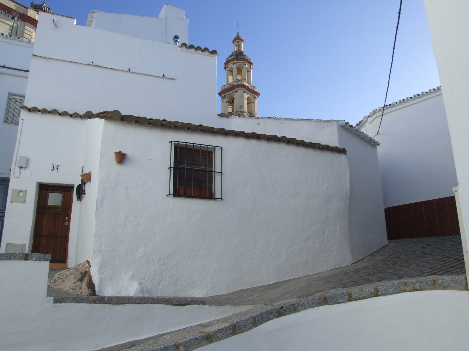 Barrio de la Villa, Olvera (Cádiz)